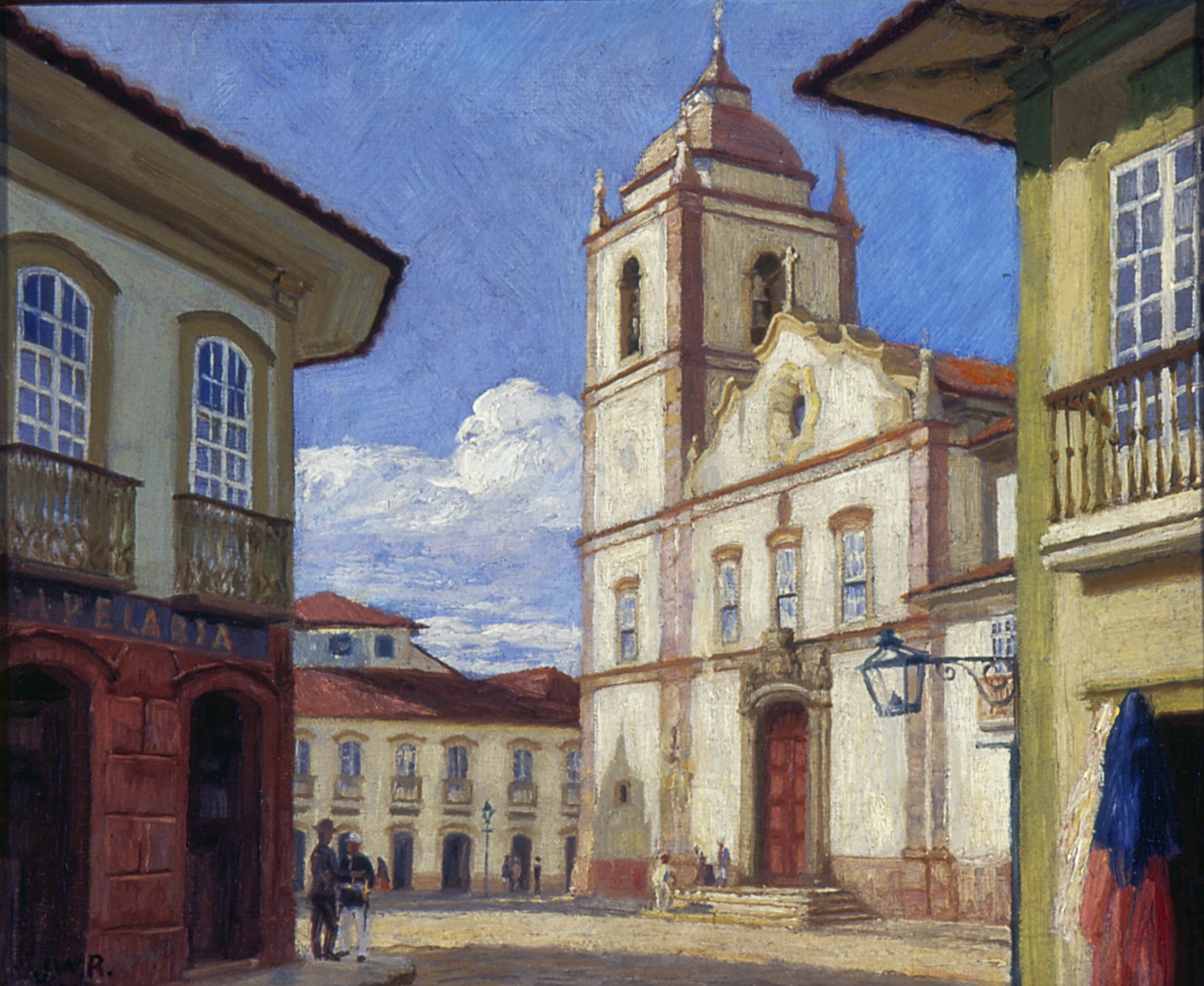 Obra que integra o acervo do Museu Paulista da USP. Coleção José Wasth Rodrigues - CJWR